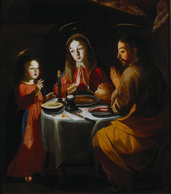 Ceia da Sagrada Família por Josefa de Óbidos no Museu de Évora, Portugal.